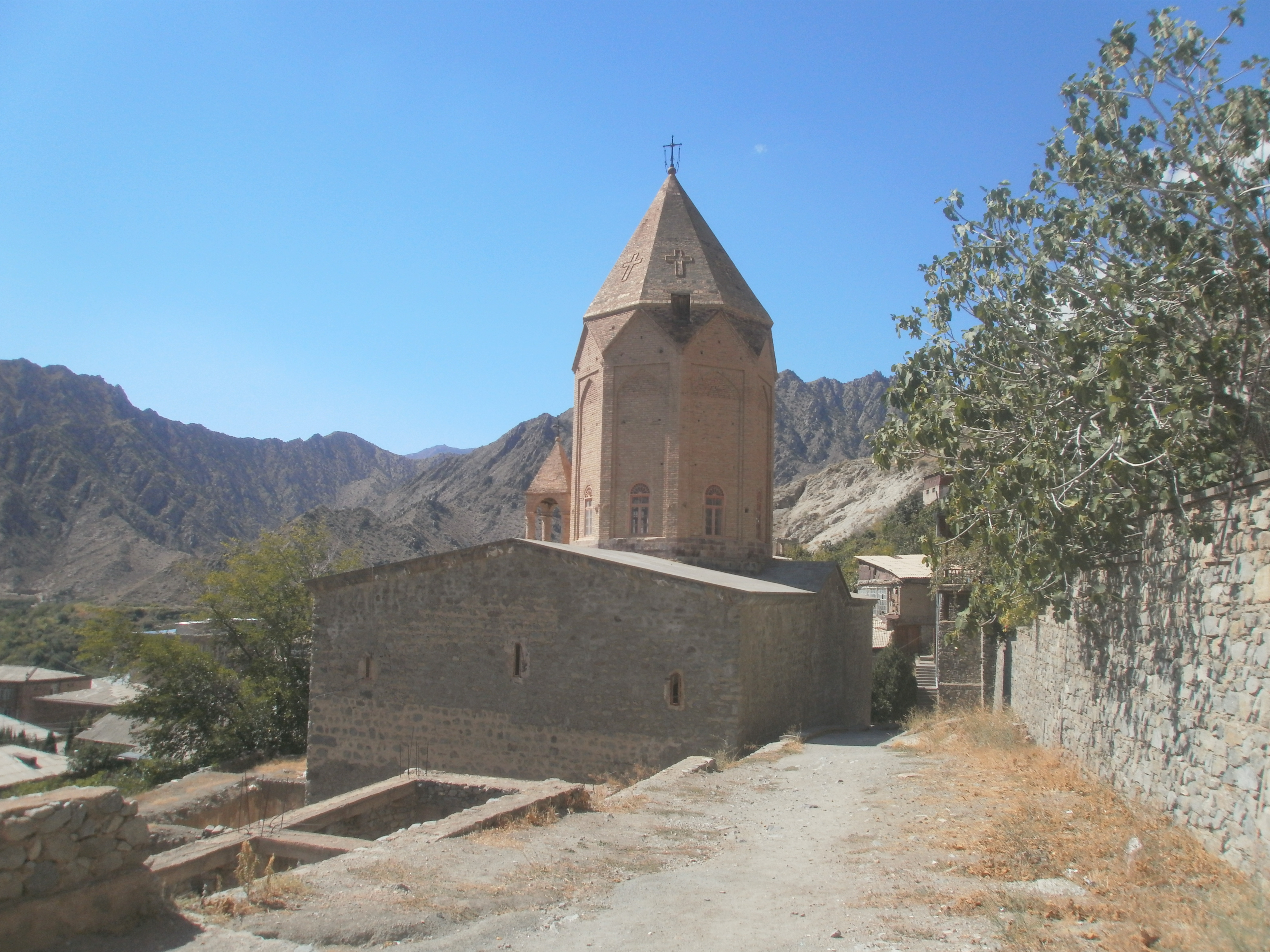 1673թ. գմբեթավոր բազիլիկ,19դ.` որմնանկարներով 5/1.24